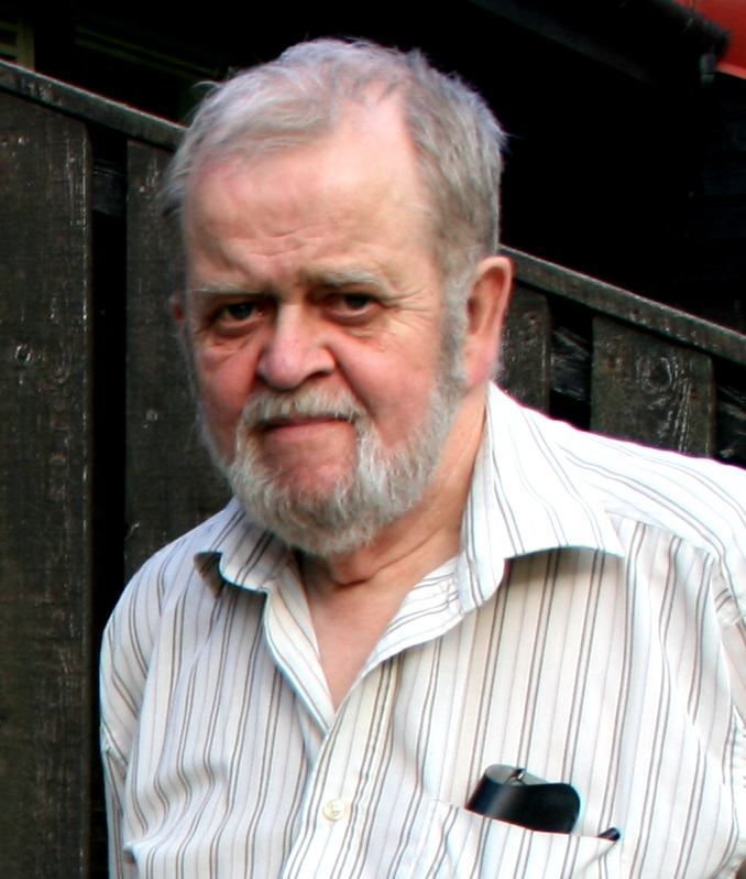 Ólafur Th Ólafsson á Selfossi